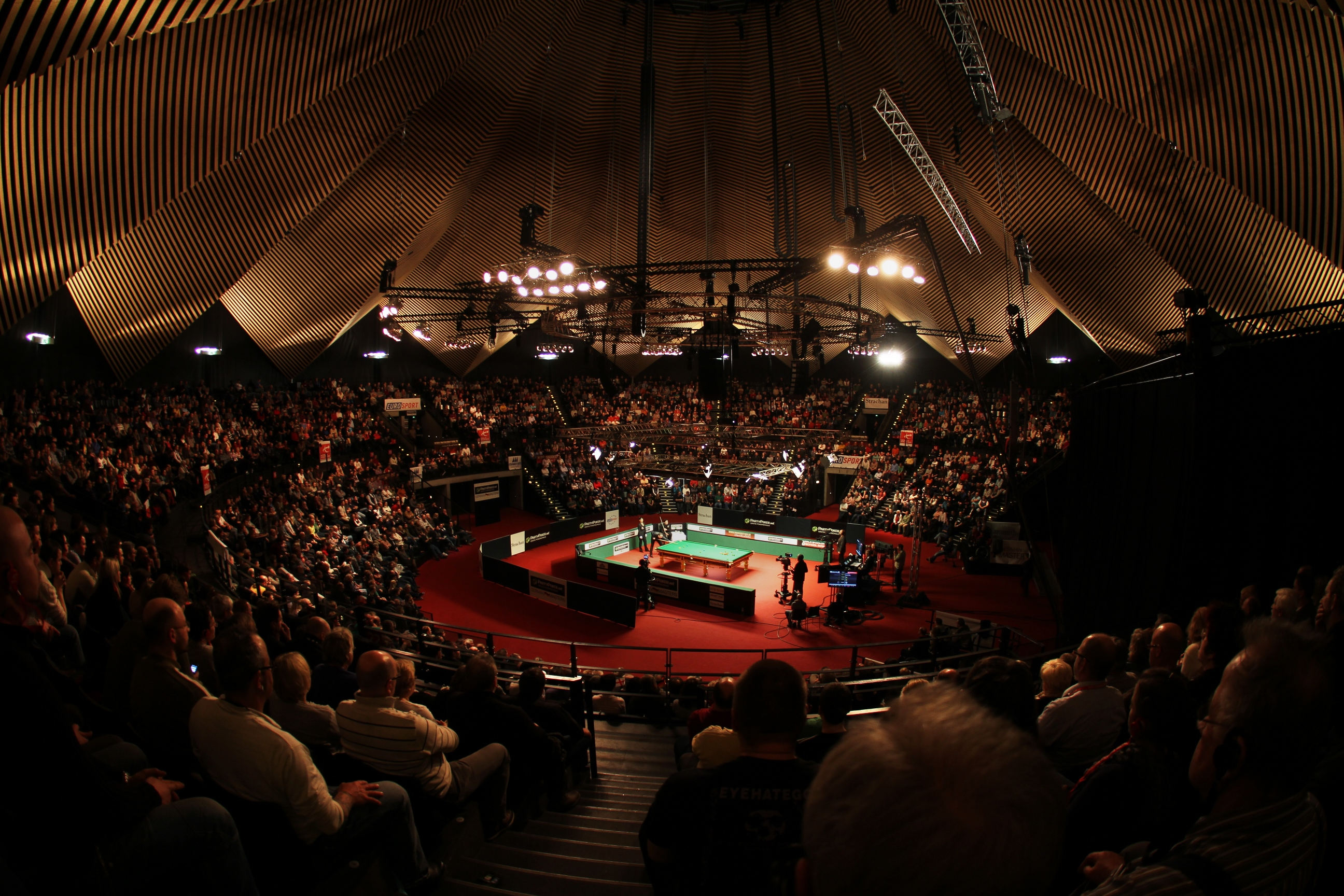 Stephen Maguire beim Stoß im Finale des German Masters 2012 Snookerturniers im berliner Tempodrom. In Hintergrund sind sein Gegner Ronnie O’Sullivan sowie Schiedsrichterin Michaela Tabb